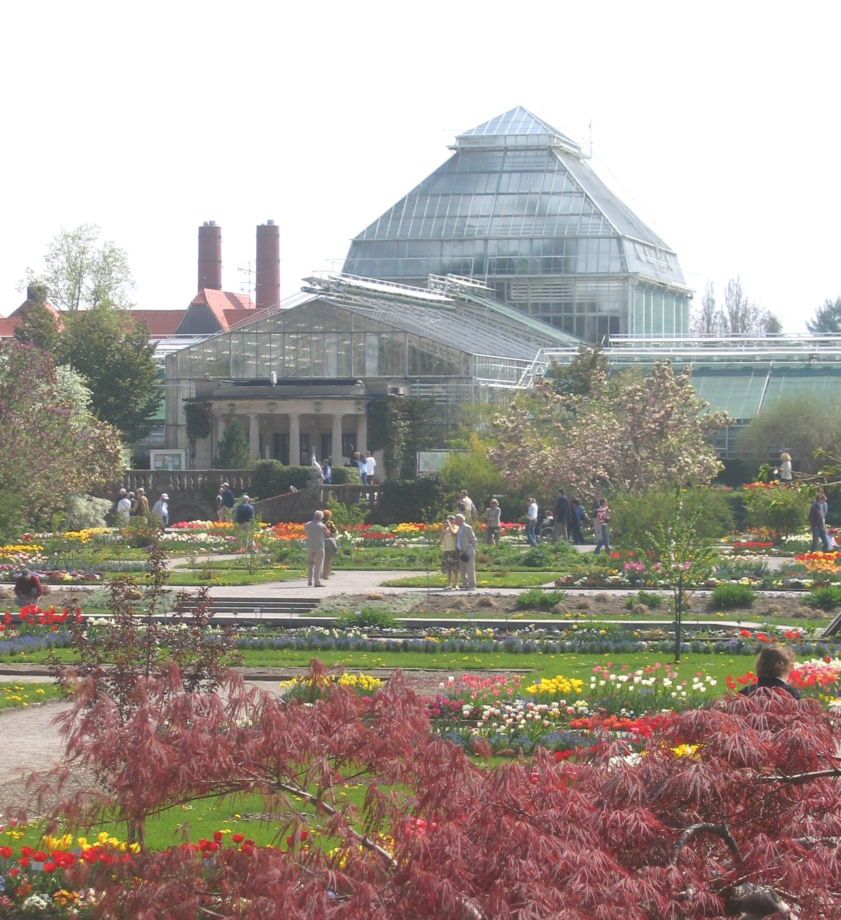 Botanischer Garten in München